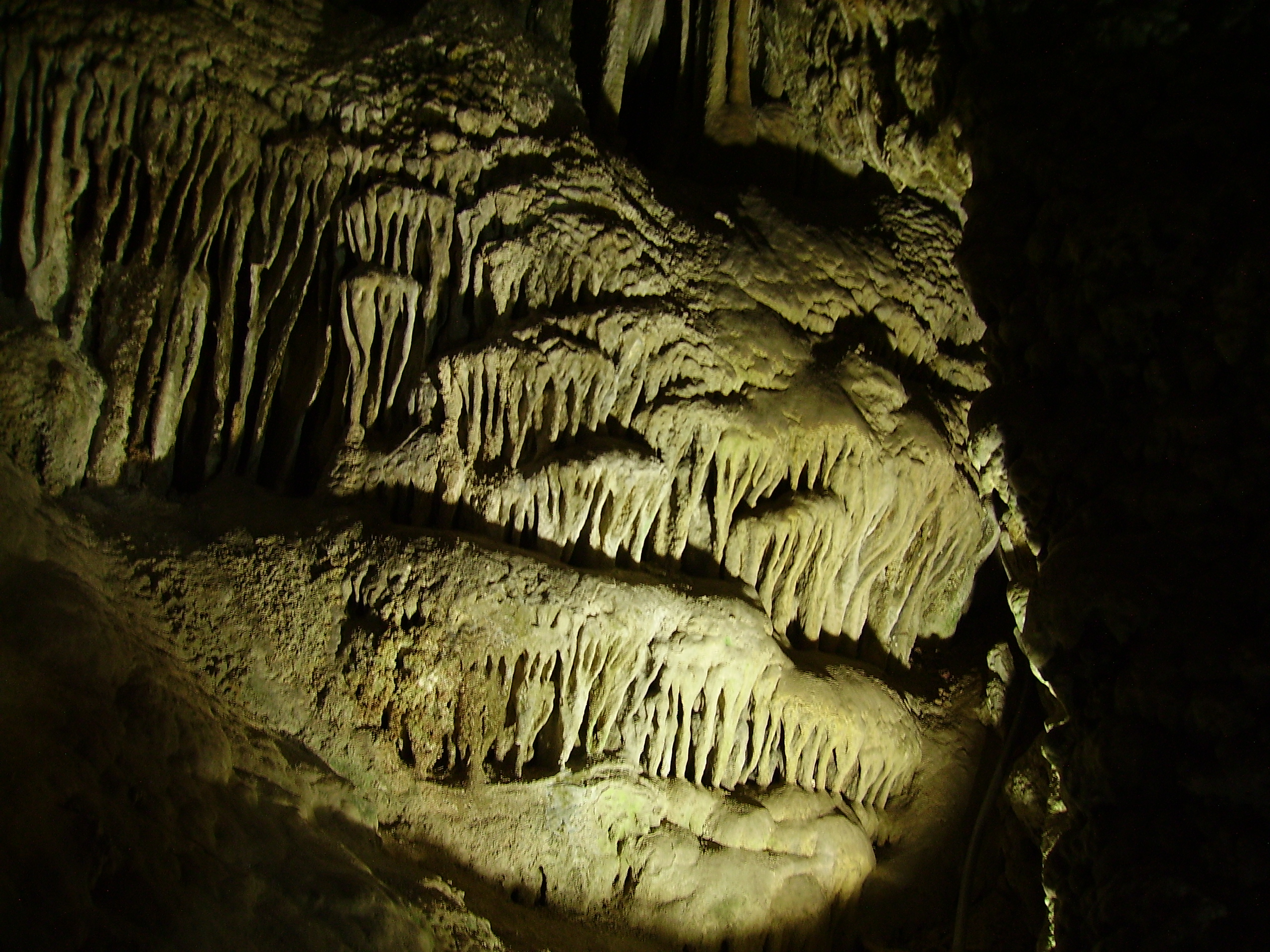 Cueva de Nerja